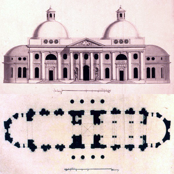 Храм Казанской иконы Божией Матери в селе Ярополец. Чертежи фасада и плана церкви для Яропольца Чернышевых из «смешанного» альбома. Конец 1770-х гг. ГНИМА имени А.В. Щусева.